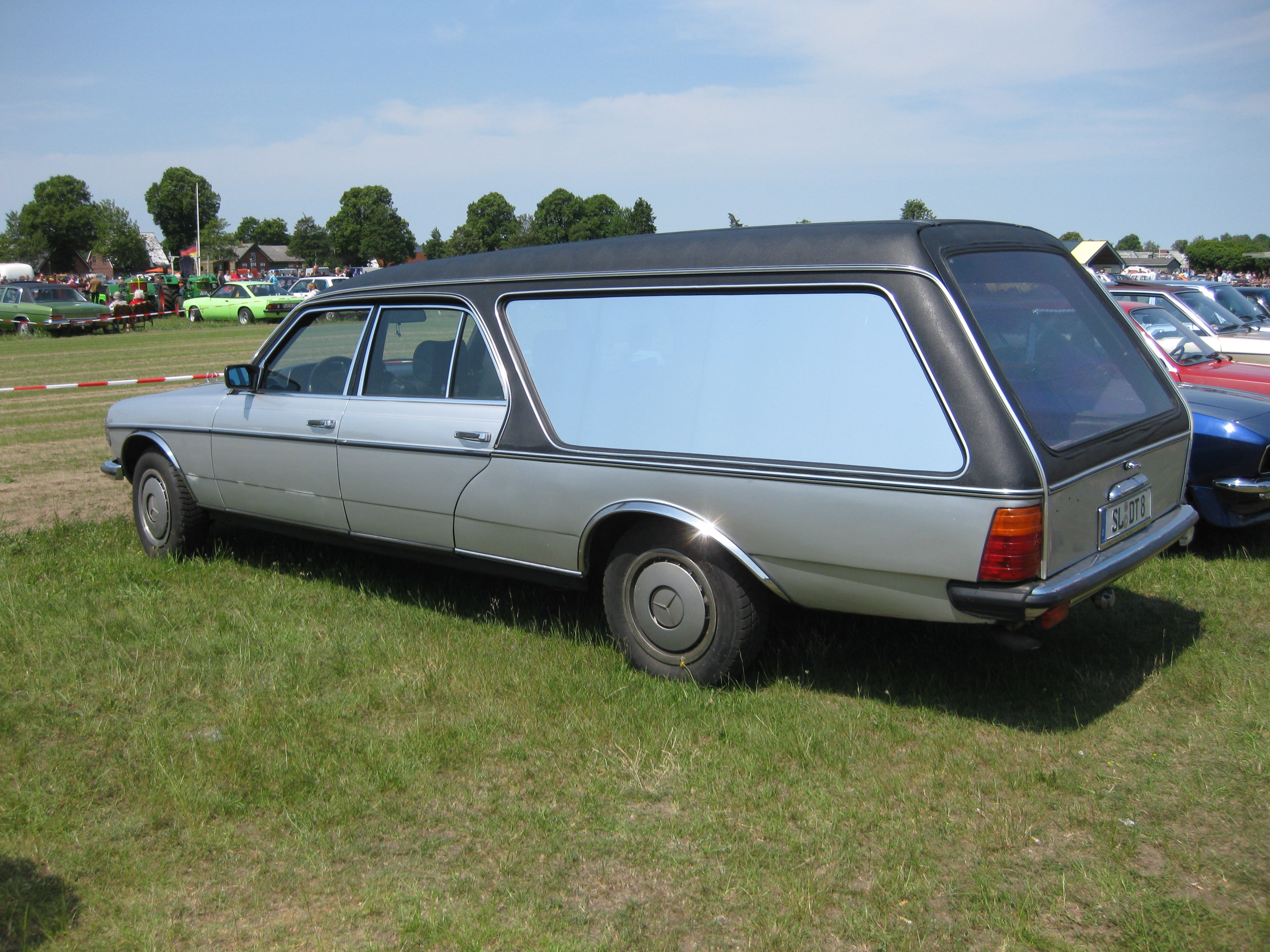 Mercedes-Benz W123 Bestattungswagen